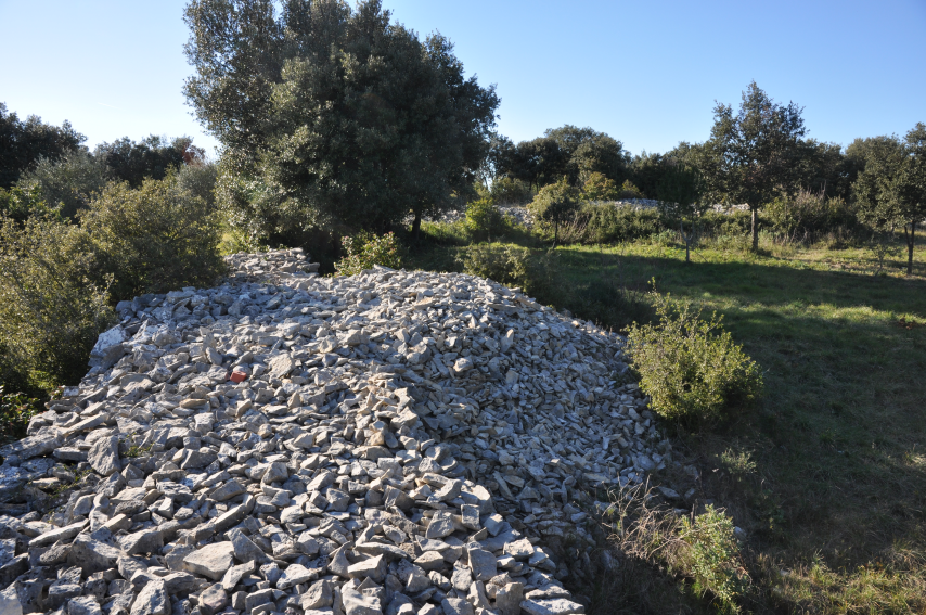 Clapas garrigues nîmoises